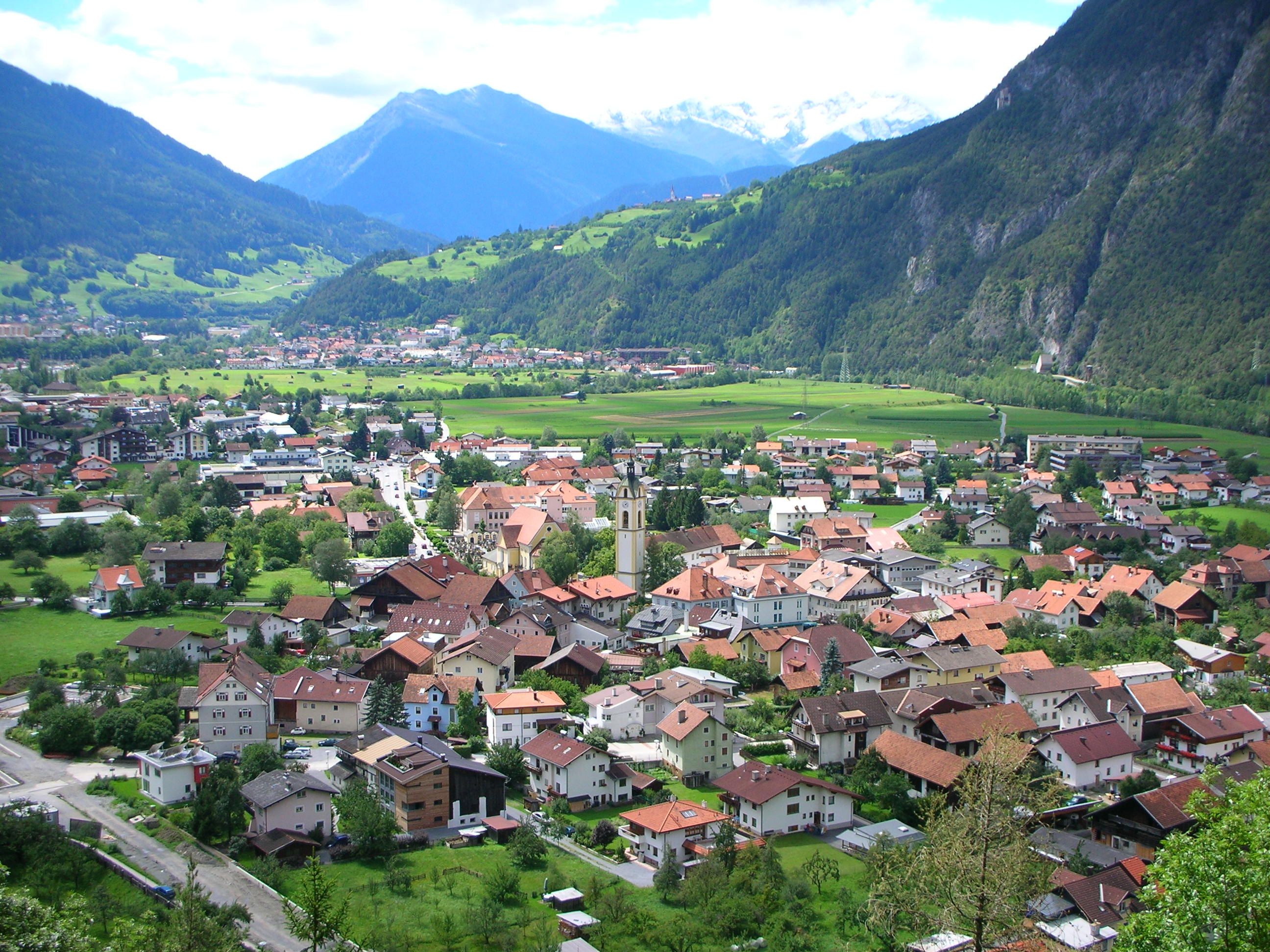 Панорамен изглед от град Цамс